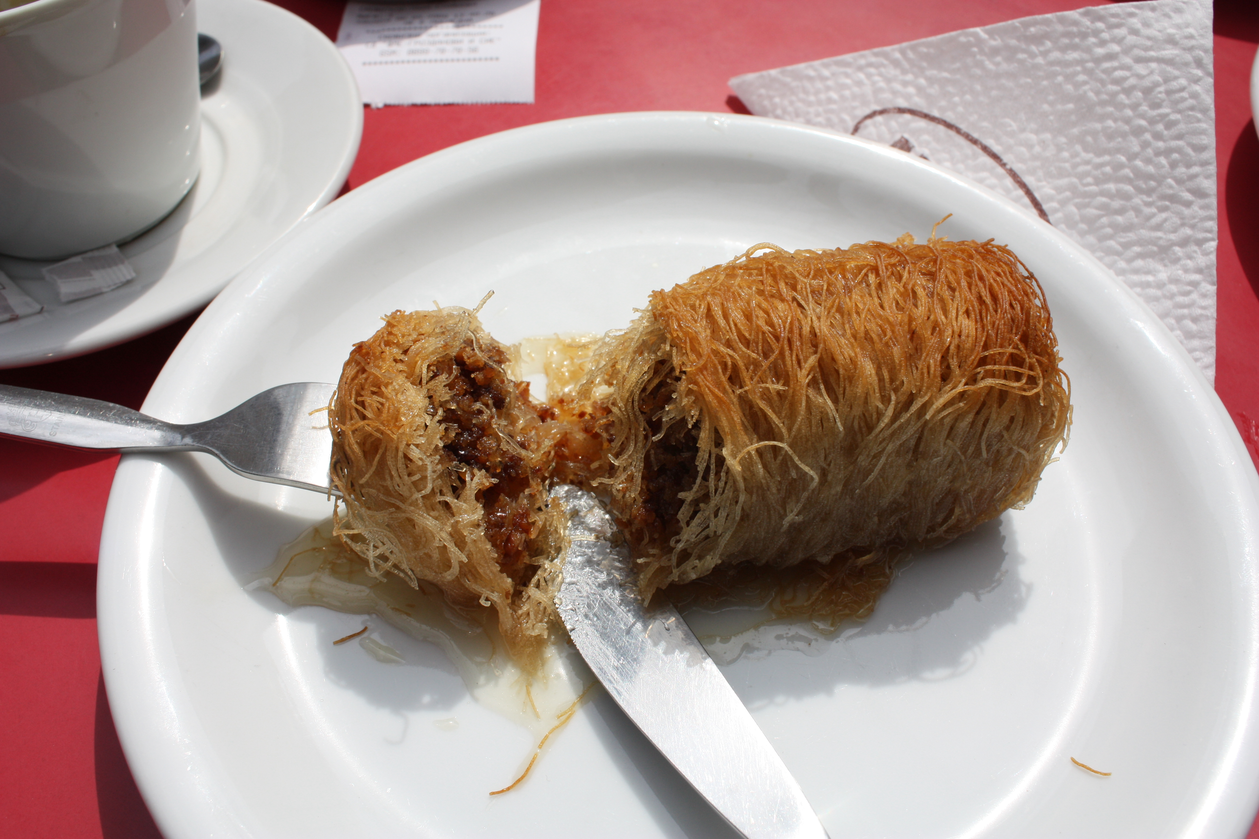 Kadaif in Sofia, Bulgaria